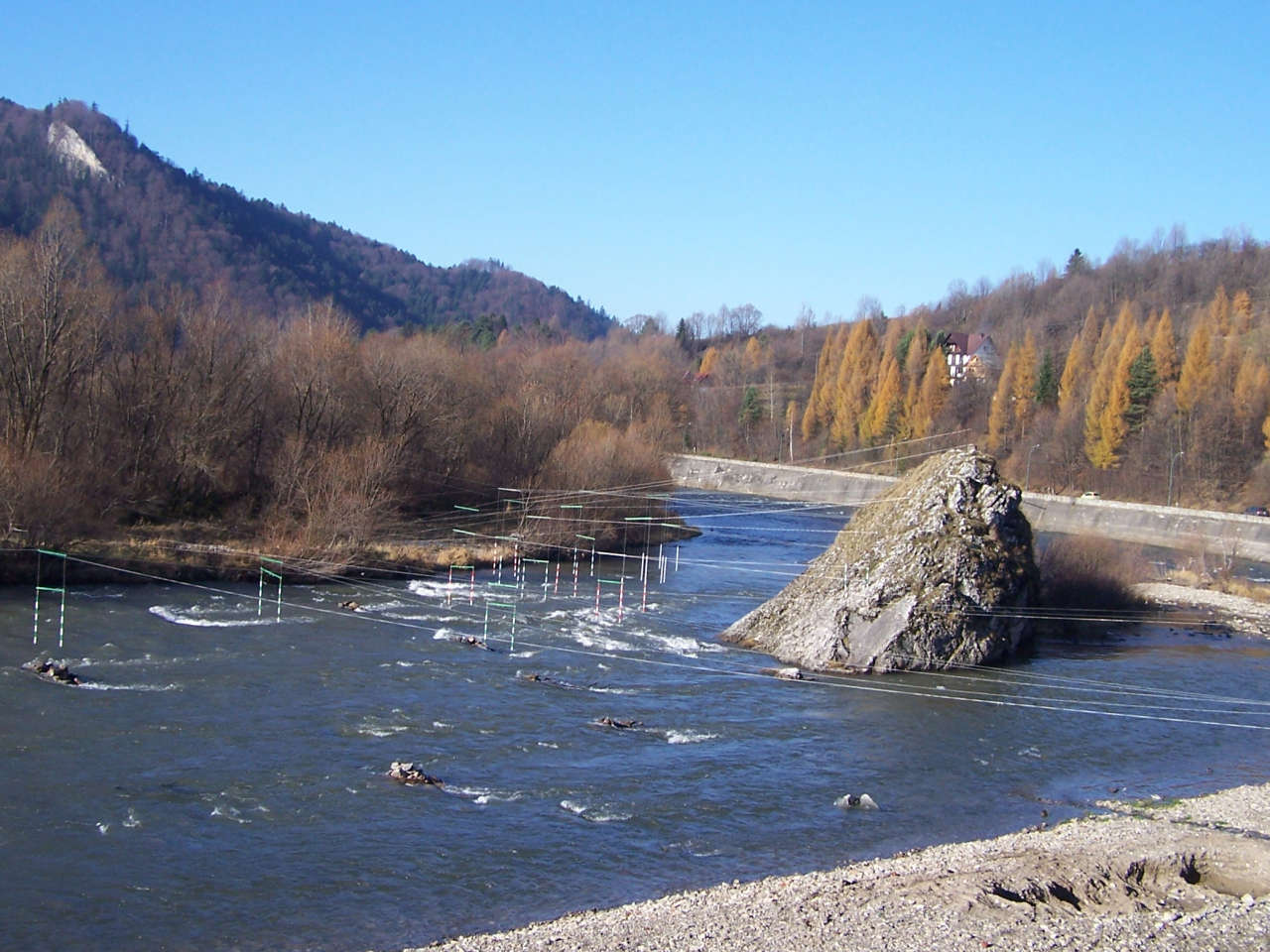 Skała Kotuńka w Szczawnicy na Dunajcu